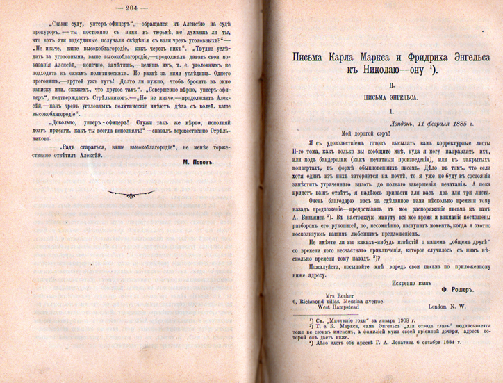 Разворот журнала «Минувшие годы», 1908 год, № 2